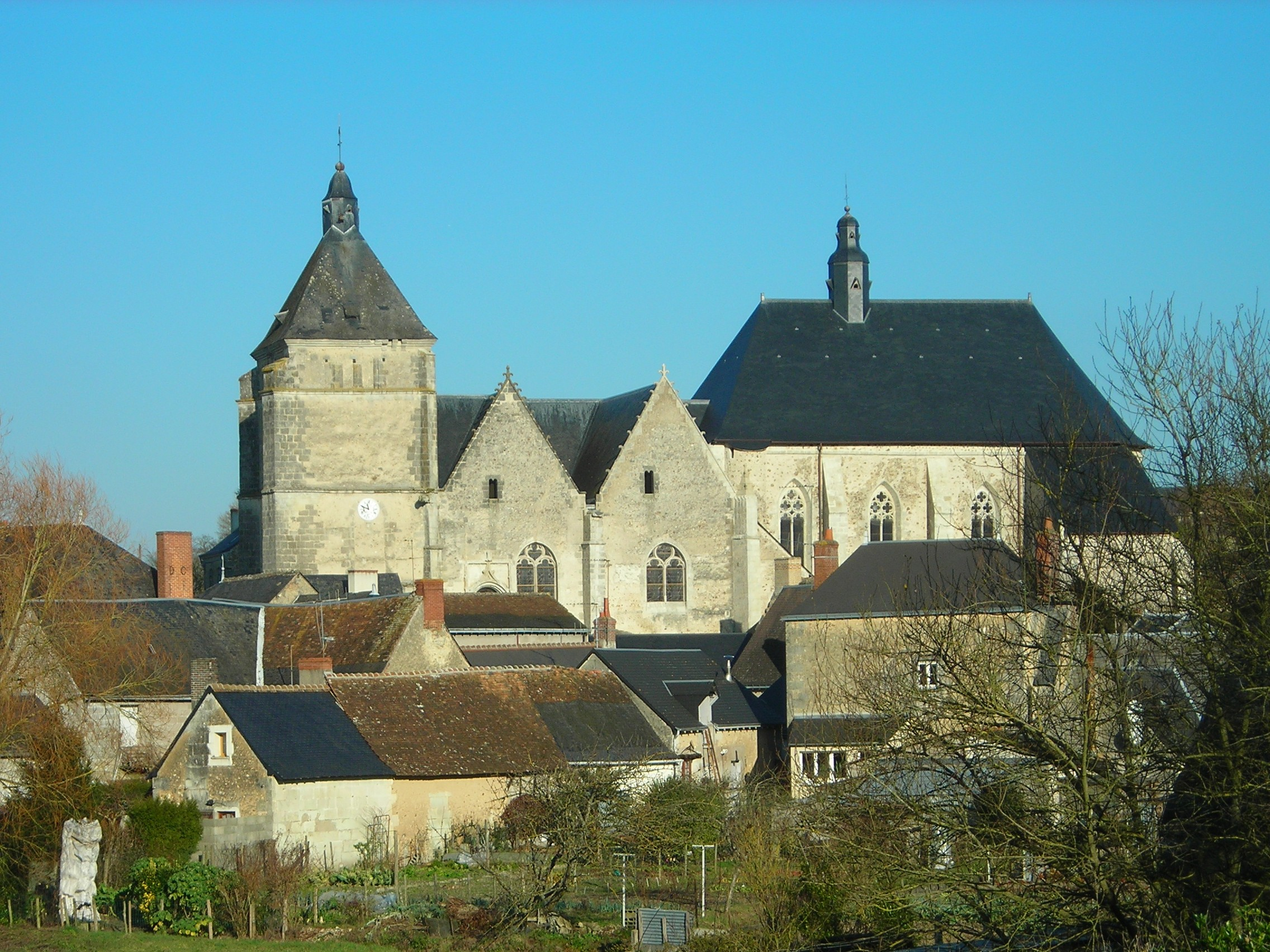 Église Saint-Pierre et Collégiale Saint-Michel de Bueil-en-Touraine (Indre-et-Loire)